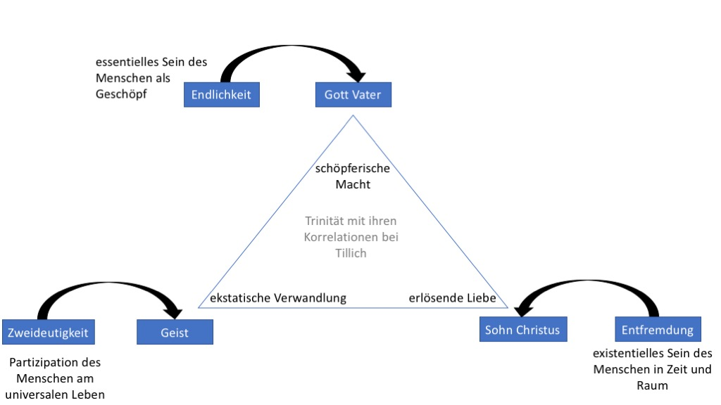 Trinität und ihre Korrelationen bei Tillich